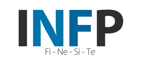 Logo INFP MBTI.